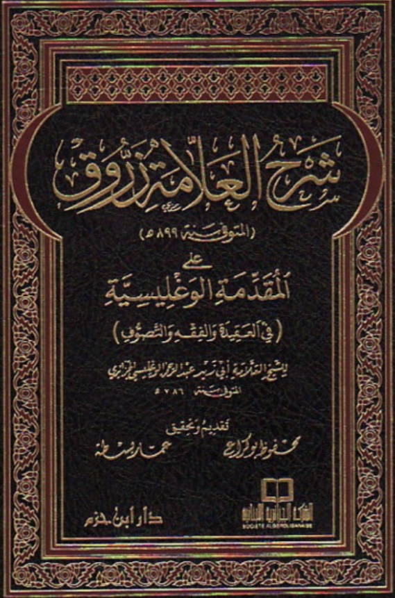 Abderrahmane El Waghlissi (3) شرح المقدمة الوغليسية على مذهب السادة المالكية - عبد الرحمن بن الوغليسي البجائي الزواوي